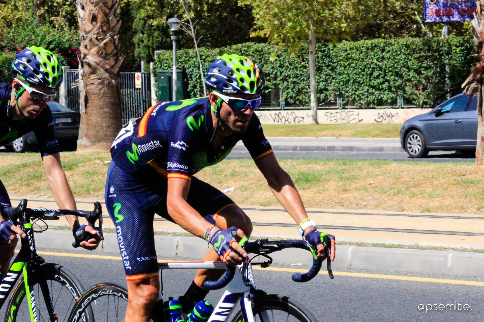 Vuelta a España 2015 | 8ª Etapa Puebla de Don Fadrique - Murcia-56